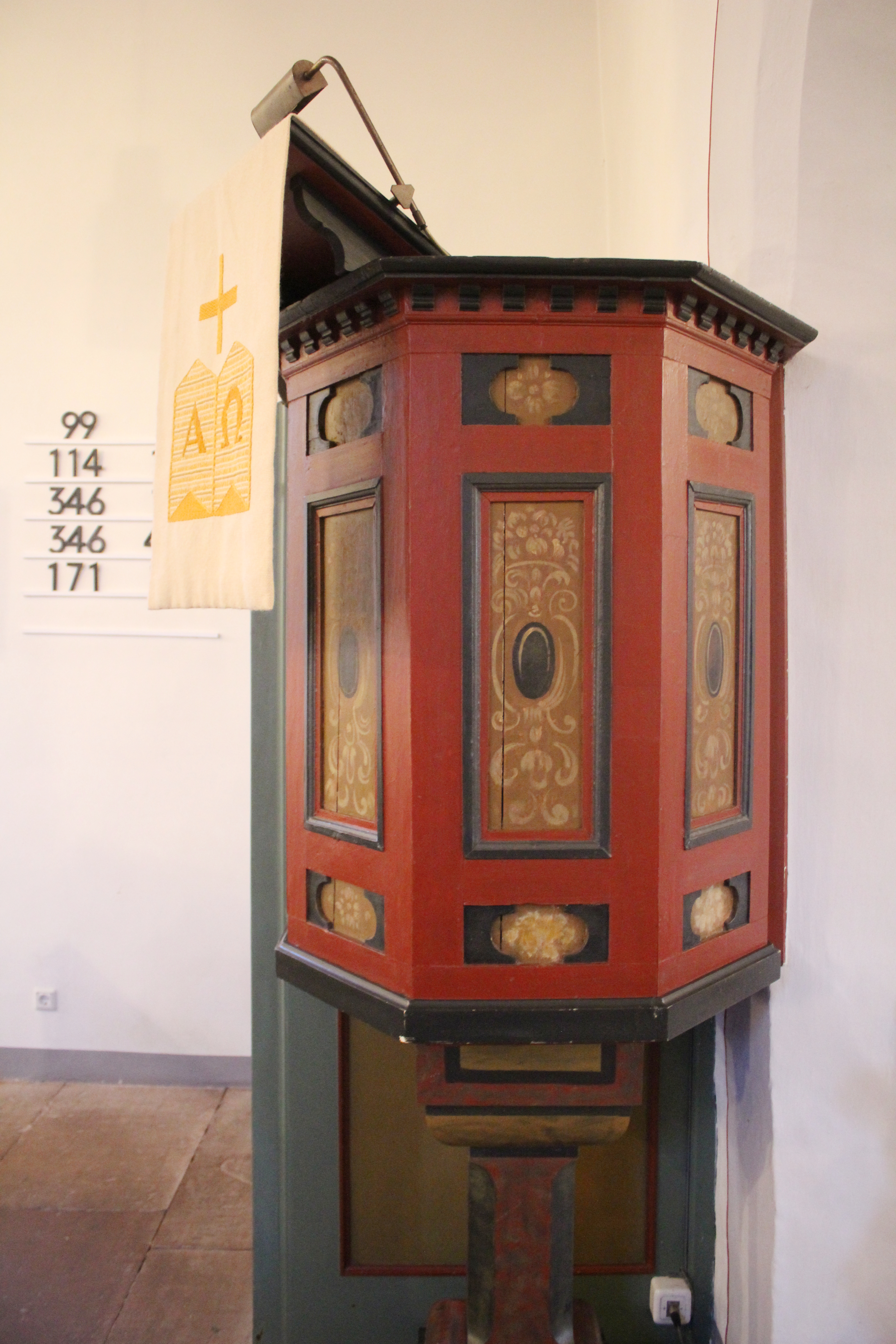 Evangelische Kirche Wolfshausen, Weimar/Lahn, Landkreis Marburg-Biedenkopf, Hessen, Deutschland